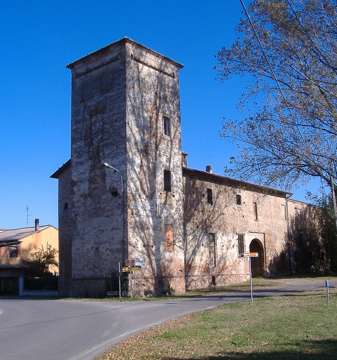 Il Castello Vecchio di Caselle Landi - Italia